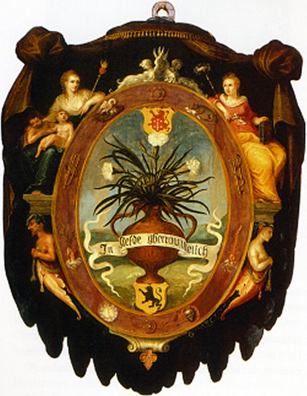 Het blazoen van de rederijkerskamer "De witte angieren" uit Haarlem